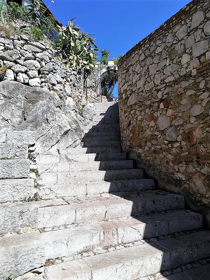 Varco e scalinata d'accesso al castello.